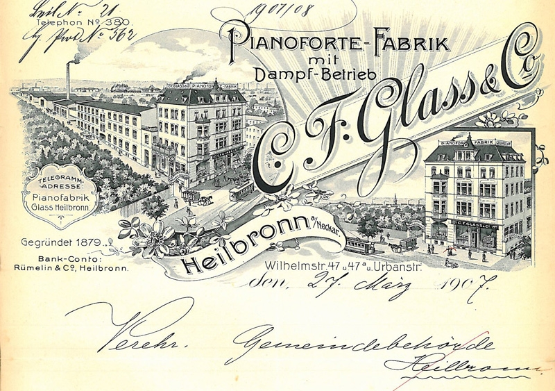 Briefkopf der Klavierfabrik C. F. Glass & Co., Stadtarchiv Heilbronn, Signatur E002-1237